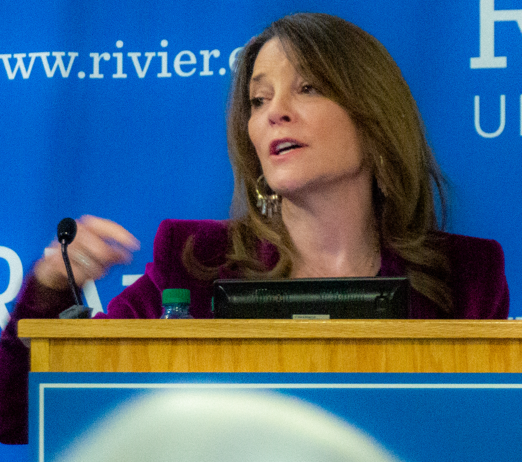 Marianne Williamson